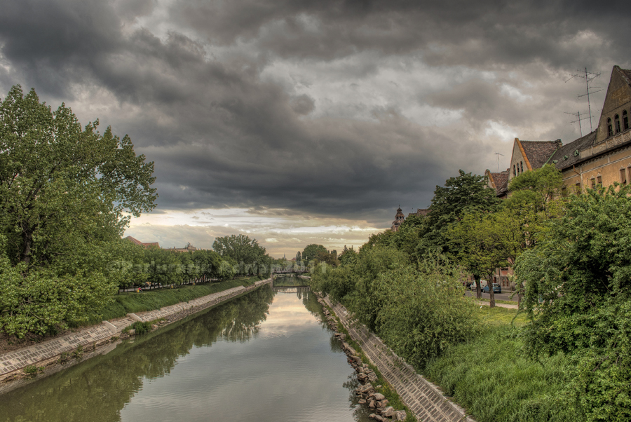 Timisoara-Bega chanal